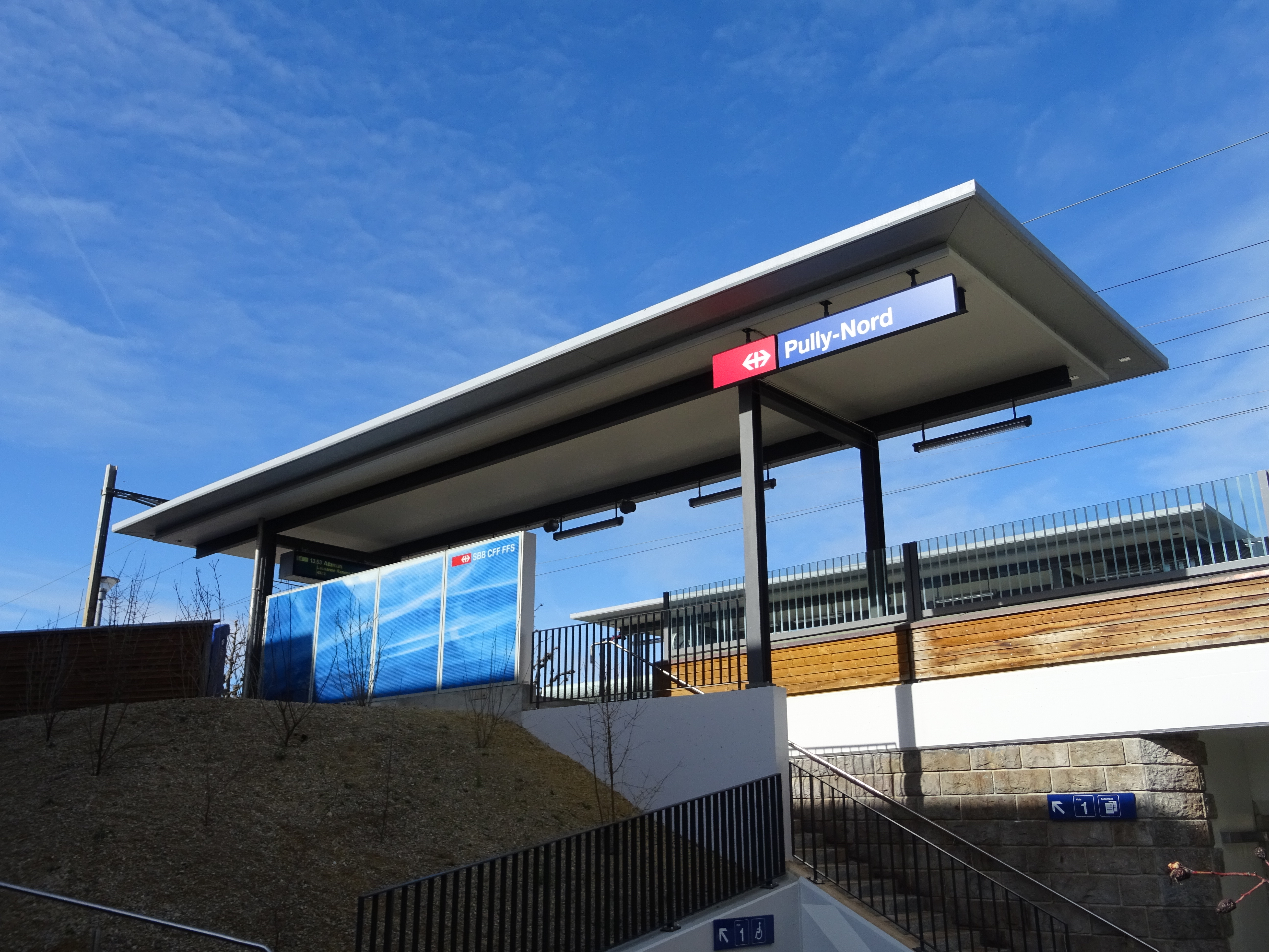 Abri pour les voyageurs de la gare de Pully-Nord sur le quai en direction de Lausanne.